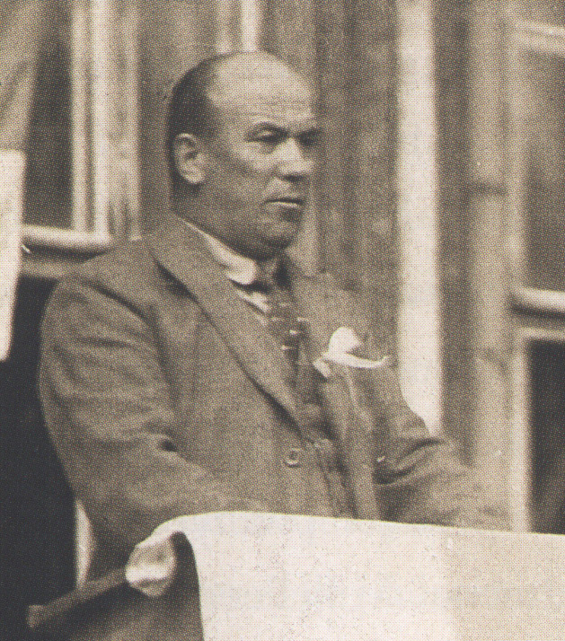 Vihtori Kosola puhumassa Lapuan päivillä 14.7.1930